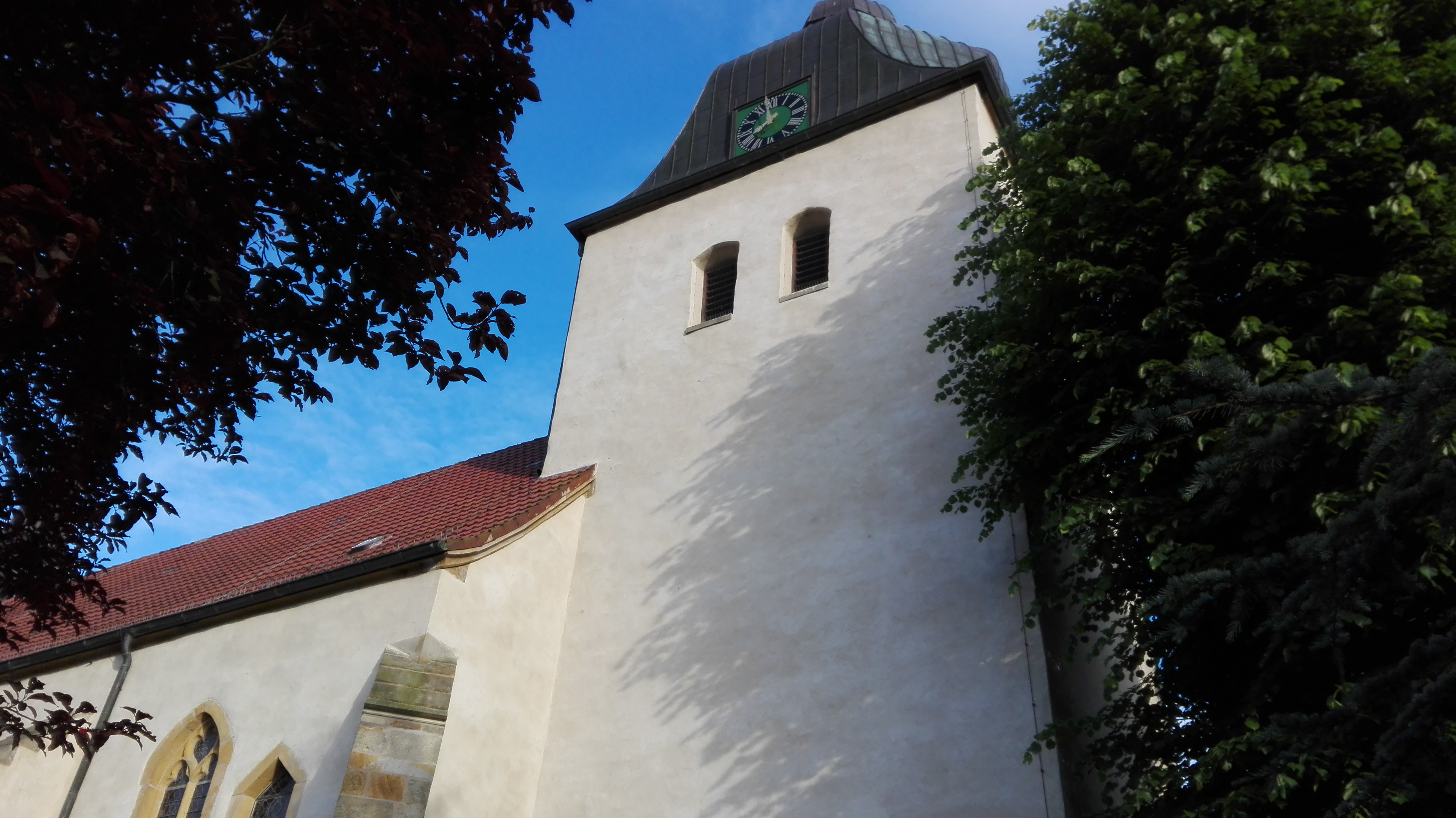 Kirche St. Johannis nach der Renovierung im Jahre 2013.